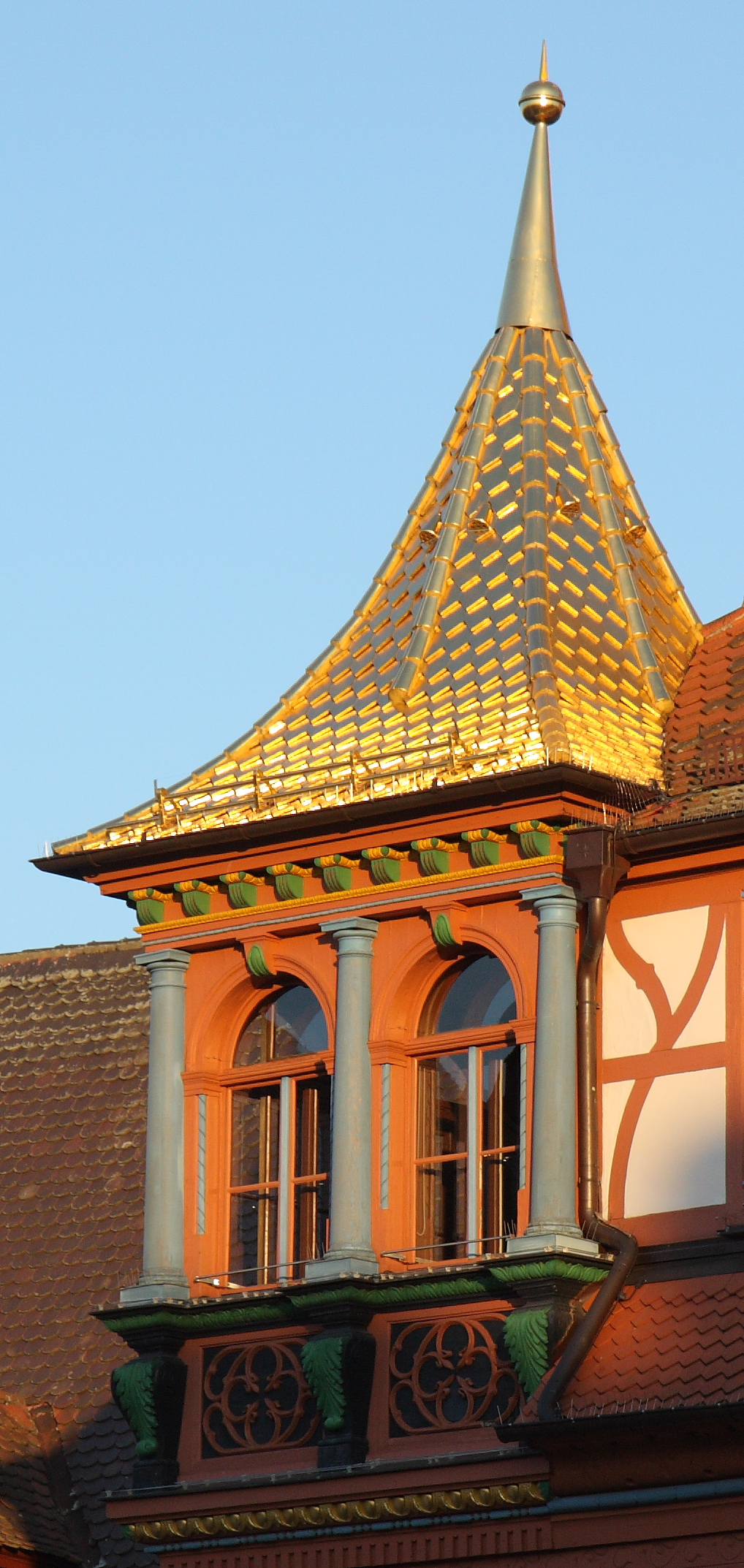 Mit Blattgold gedecktes Dach des Schwabacher Rathauses